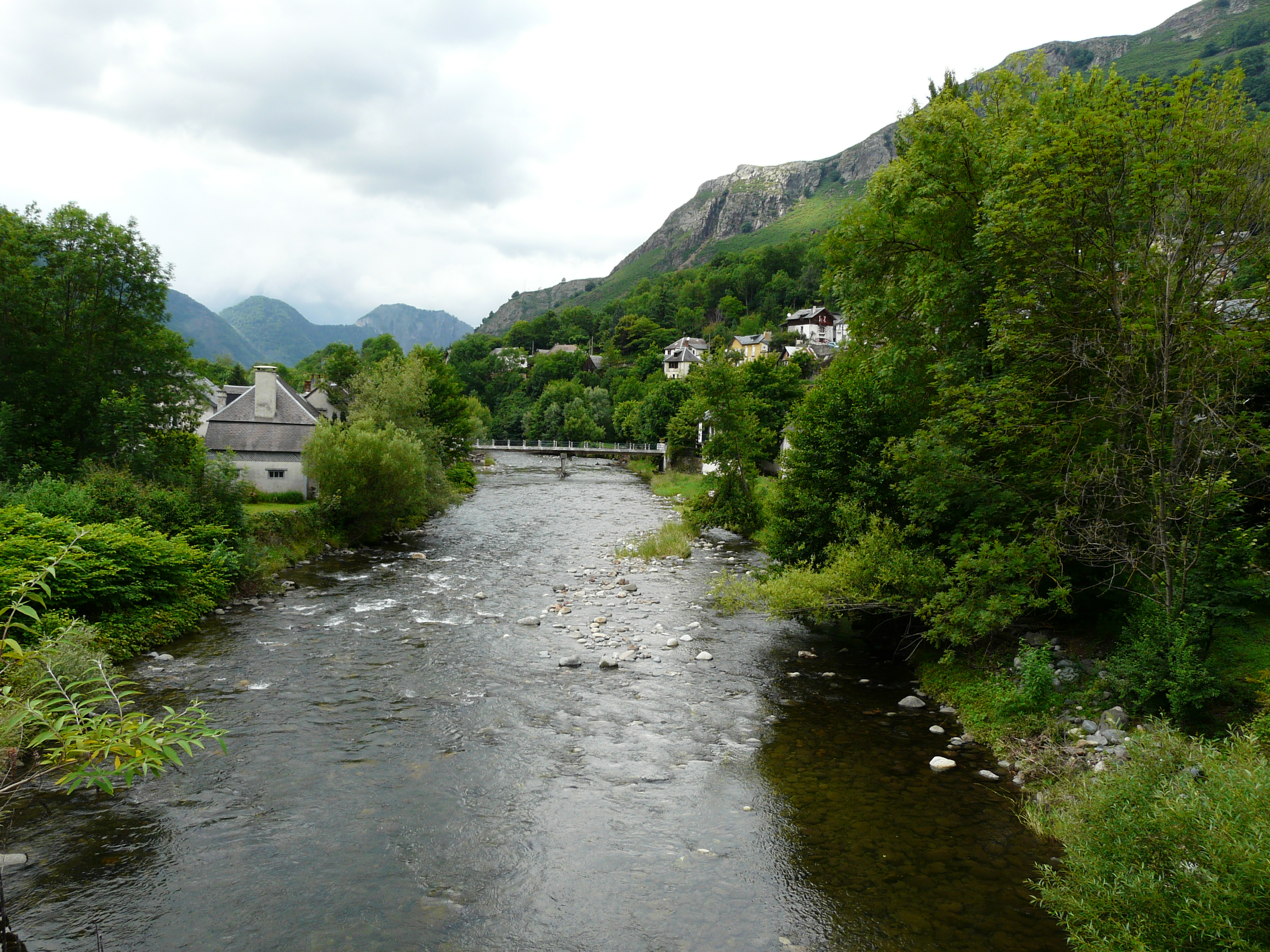 La Garonne en aval du pont de la route départementale 44h, Fos, Haute-Garonne, France. Au fond, le petit pont situé dans le village.